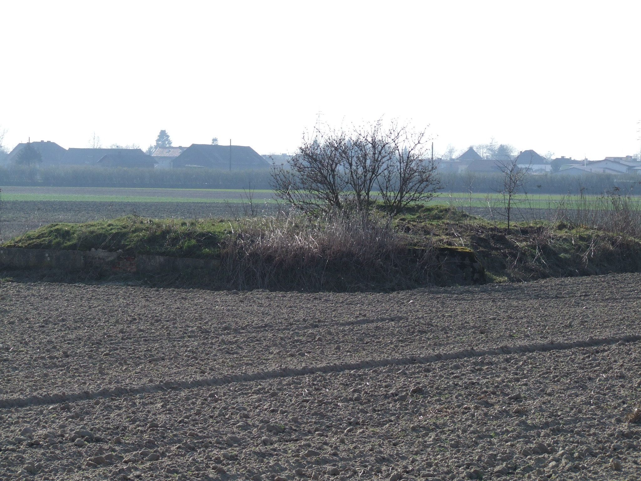 Bunkier garaszewo kopuła